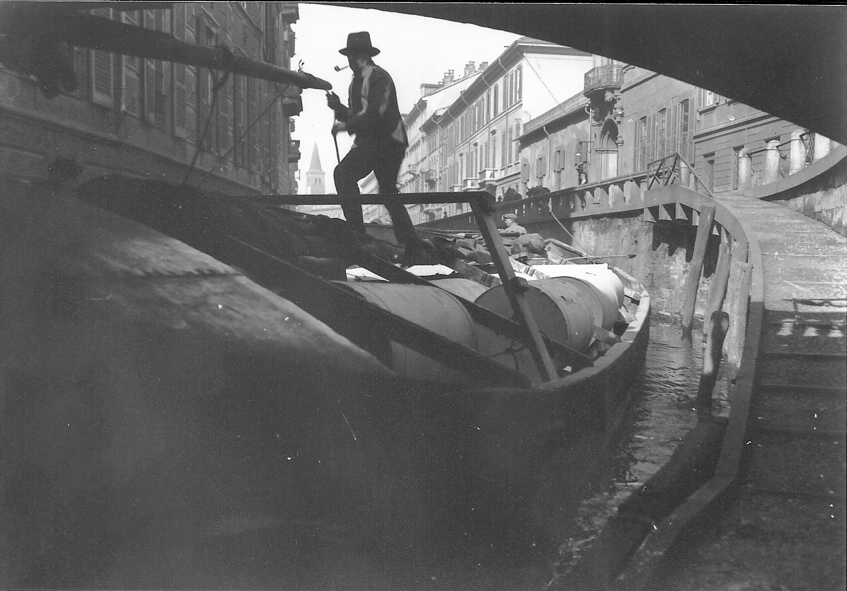 Un barcone con le bobine di carta per la stampa del Corriere prima del 1929. sotto il ponte di piazza Cavour.